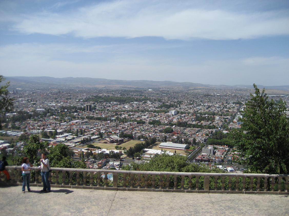 Vista parcial de Morelia / Partial view of Morelia